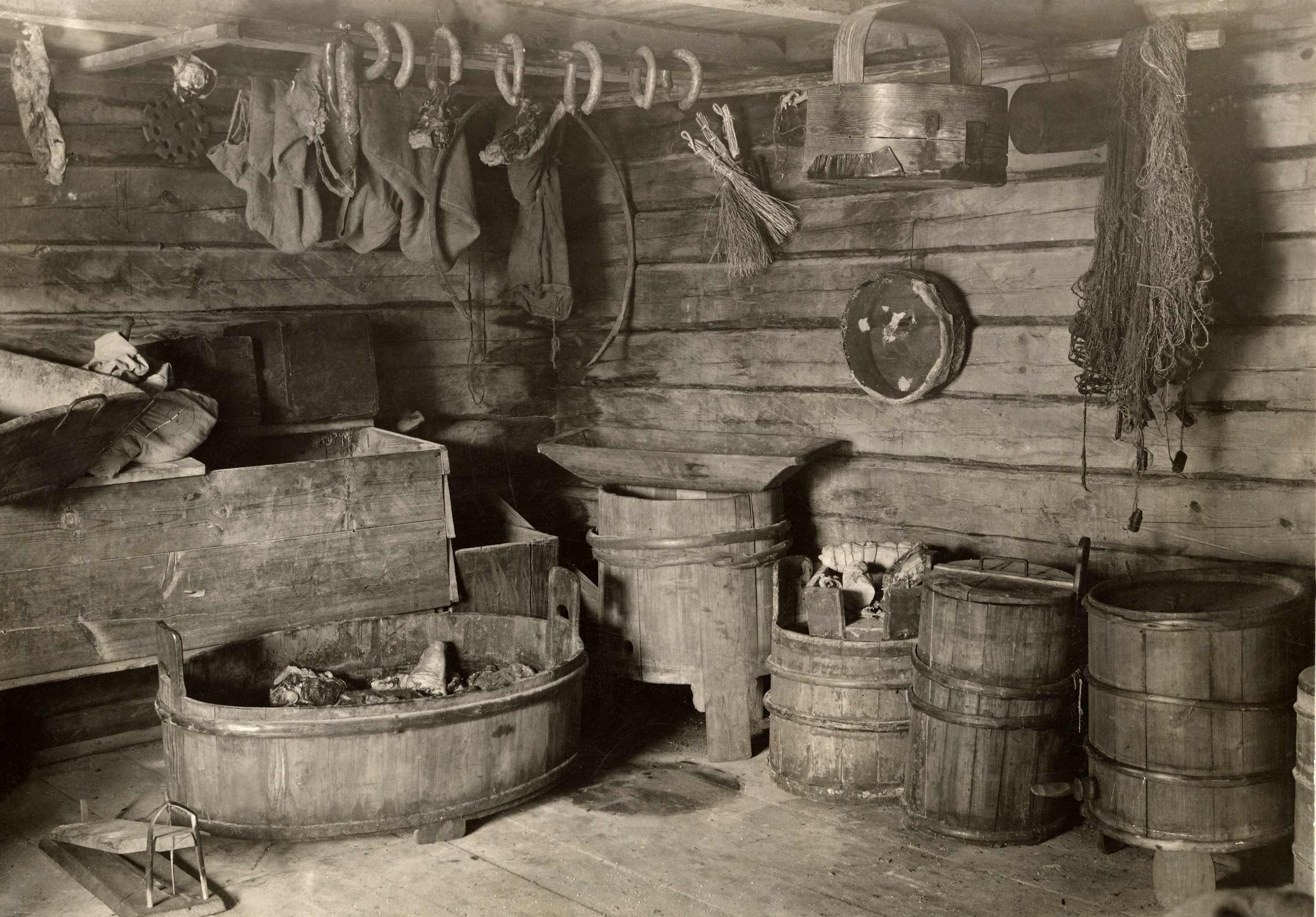 Interiör av visthusbod, Värmland. Till vänster i bild en råttfälla.